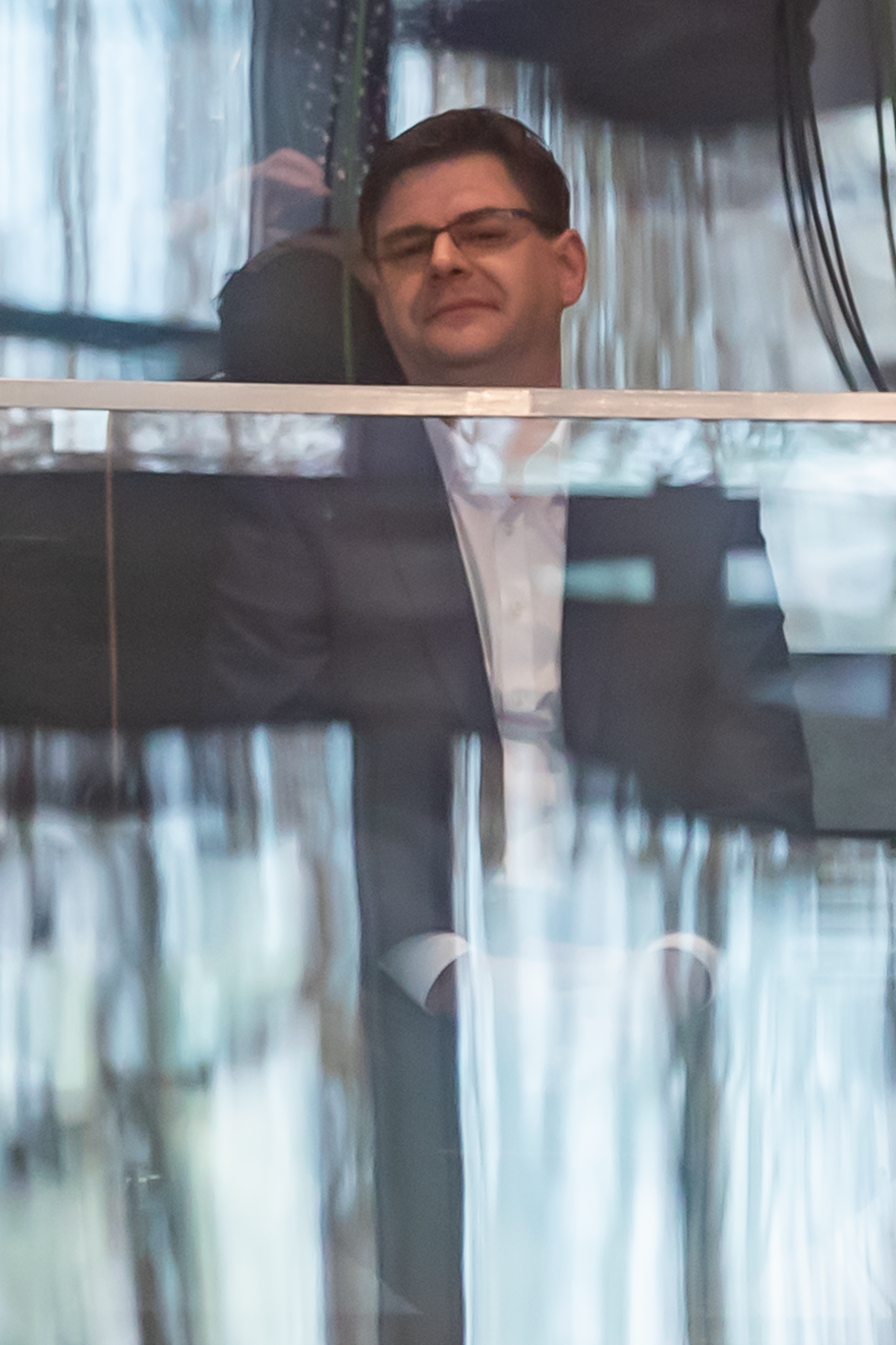 Thüringer Landtag, Wahl des Ministerpräsidenten: Christoph Kindervater (parteilos, Kandidat der AfD) auf der Besuchertribüne